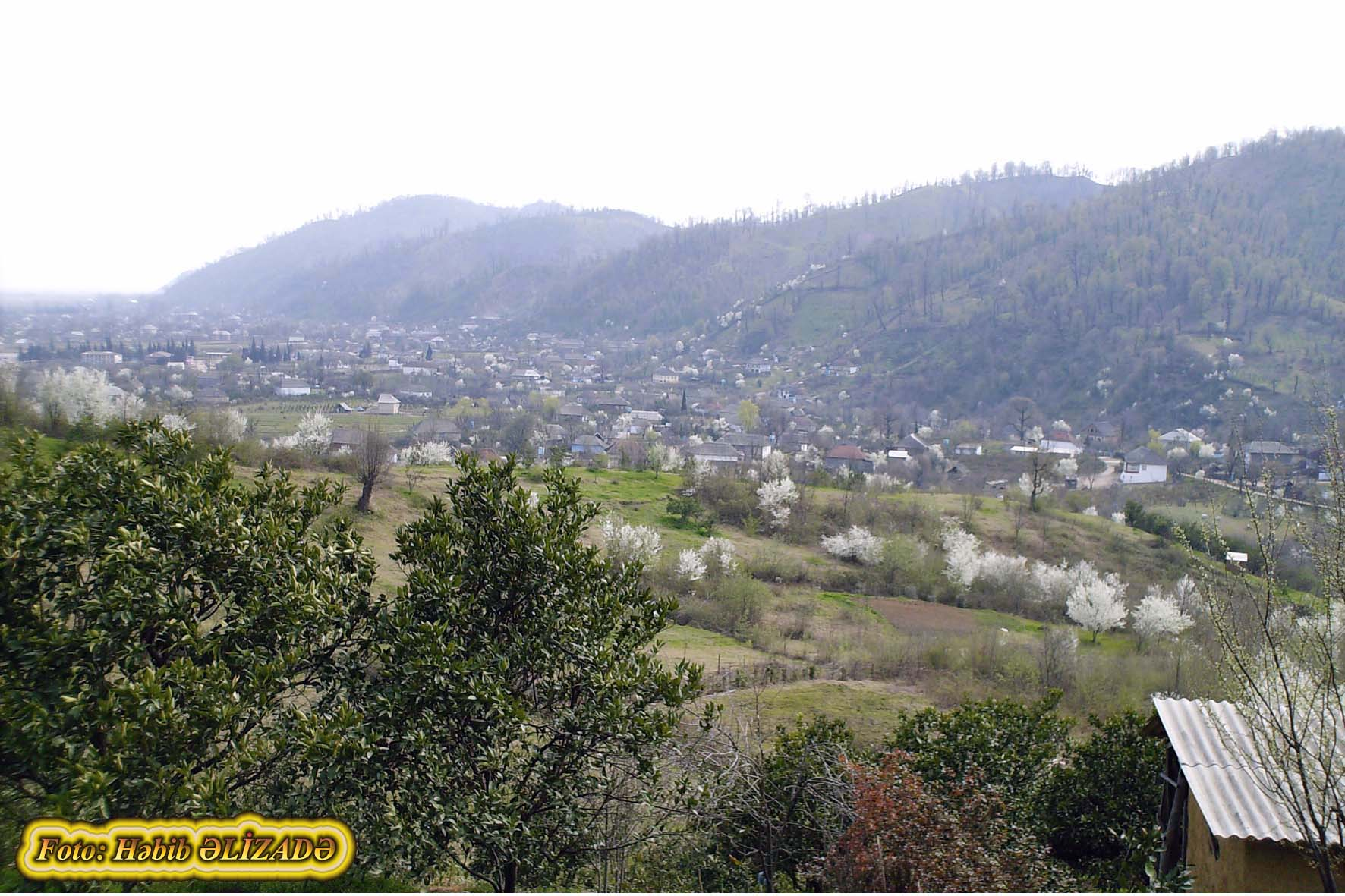 Astara, Şüvi kəndi